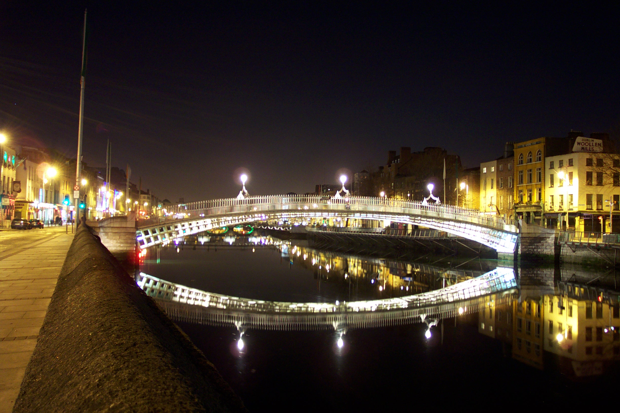 Half penny bridge di notte